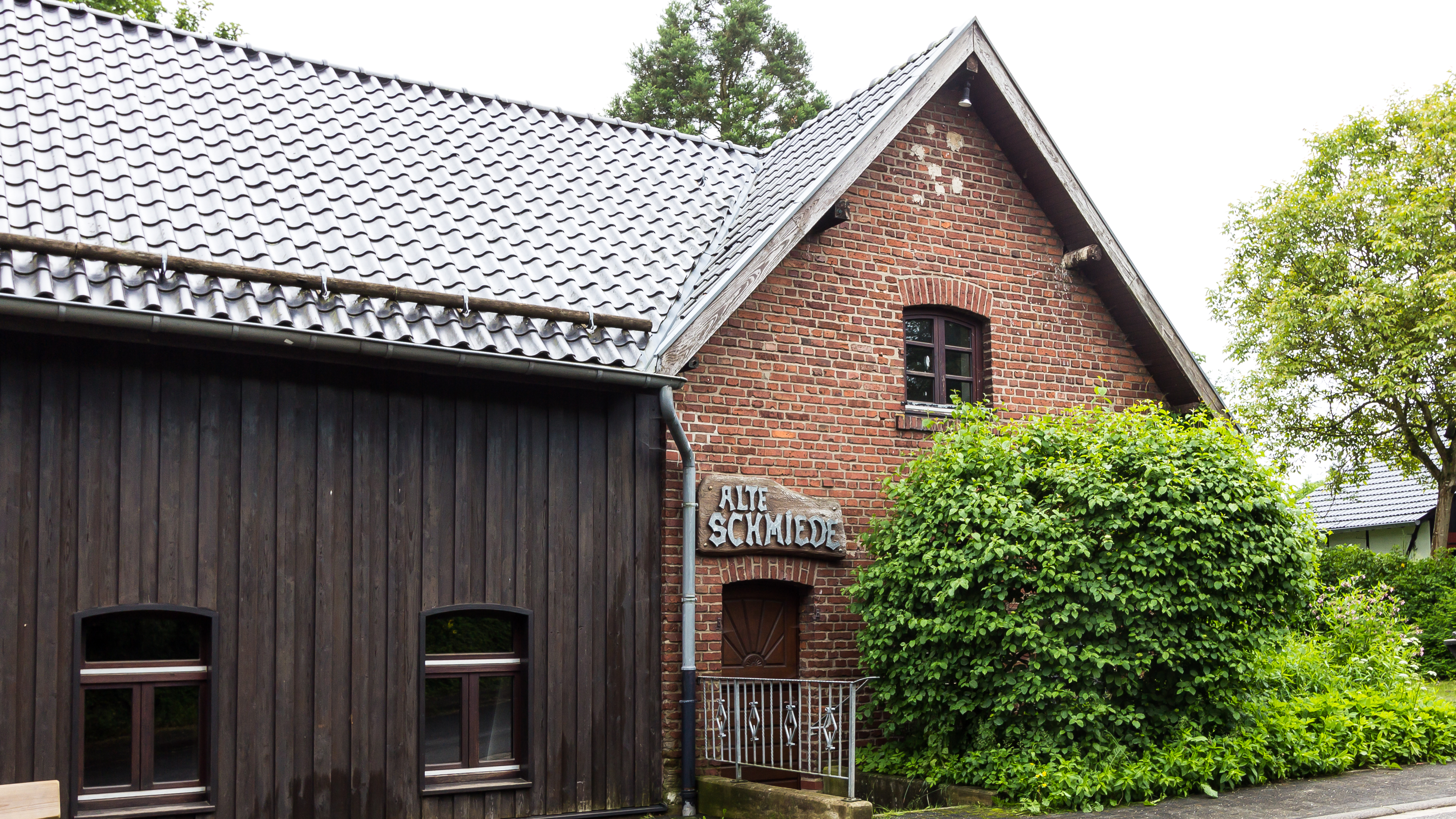 Naturzentrum Eifel Nettersheim. Die „Alte Schmiede“ ist als weiteres Ausstellungsgebäude als „Haus der Fossilien“ der Erdgeschichte und Paläontologie gewidmet.